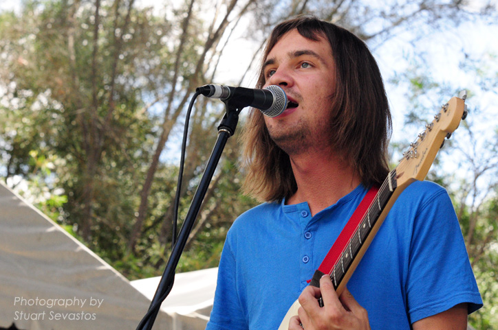 Tame Impala @ Belvoir (21/12/2008)